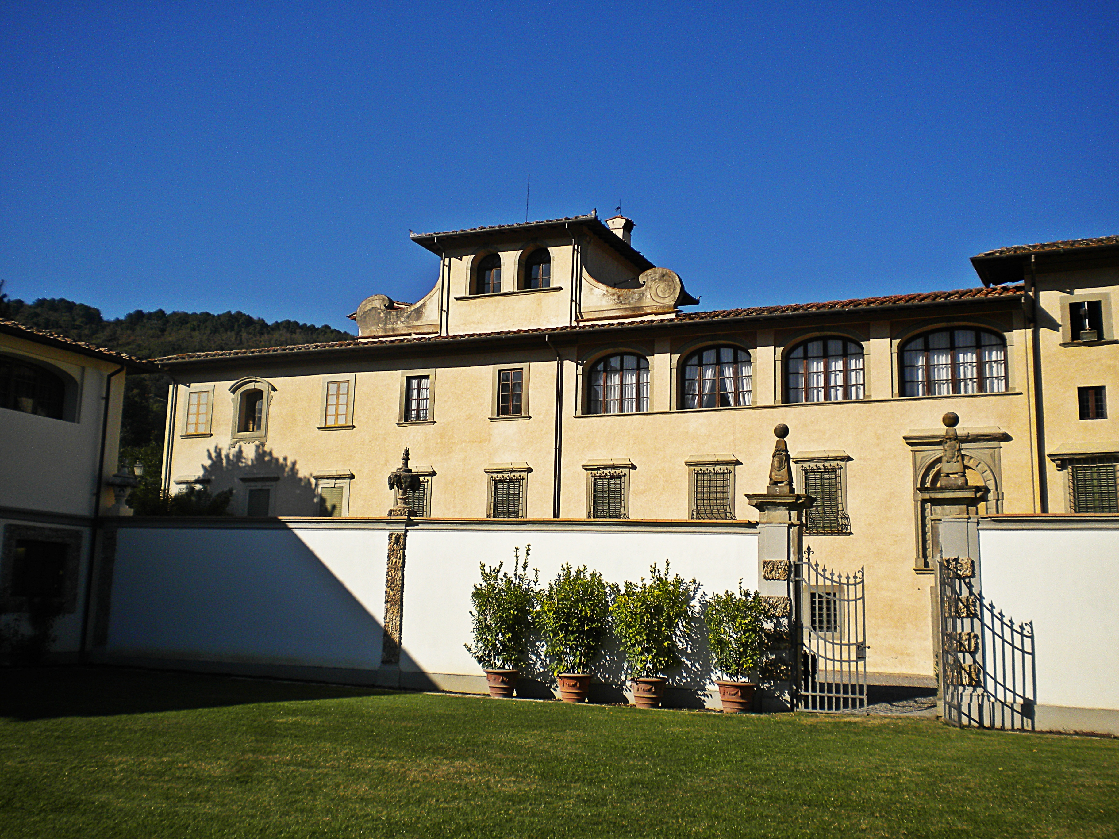 villa